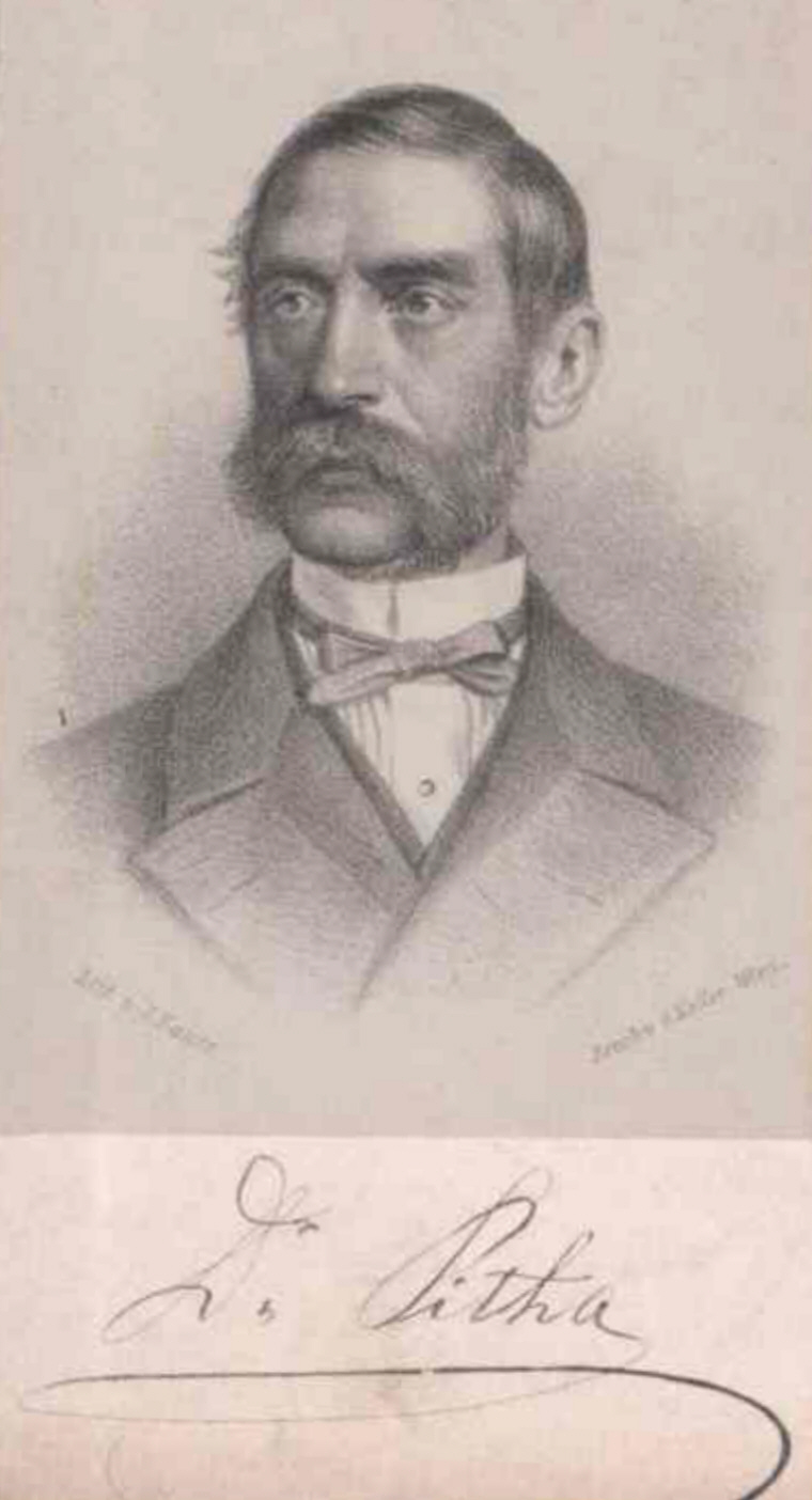 Franz von Pitha (* 8. Februar 1810; † 29. Dezember 1875), österreichischer Chirurg